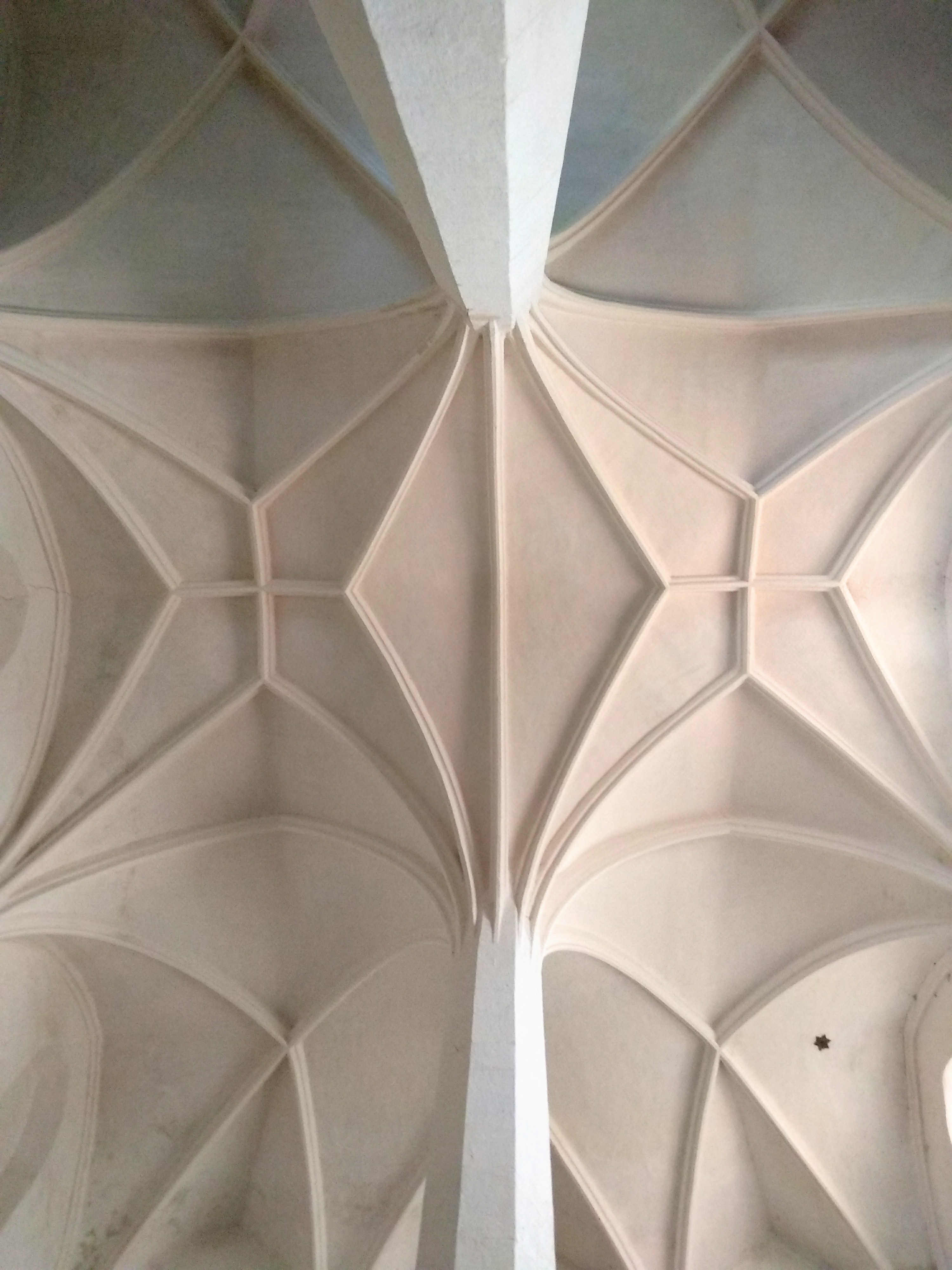 klenba